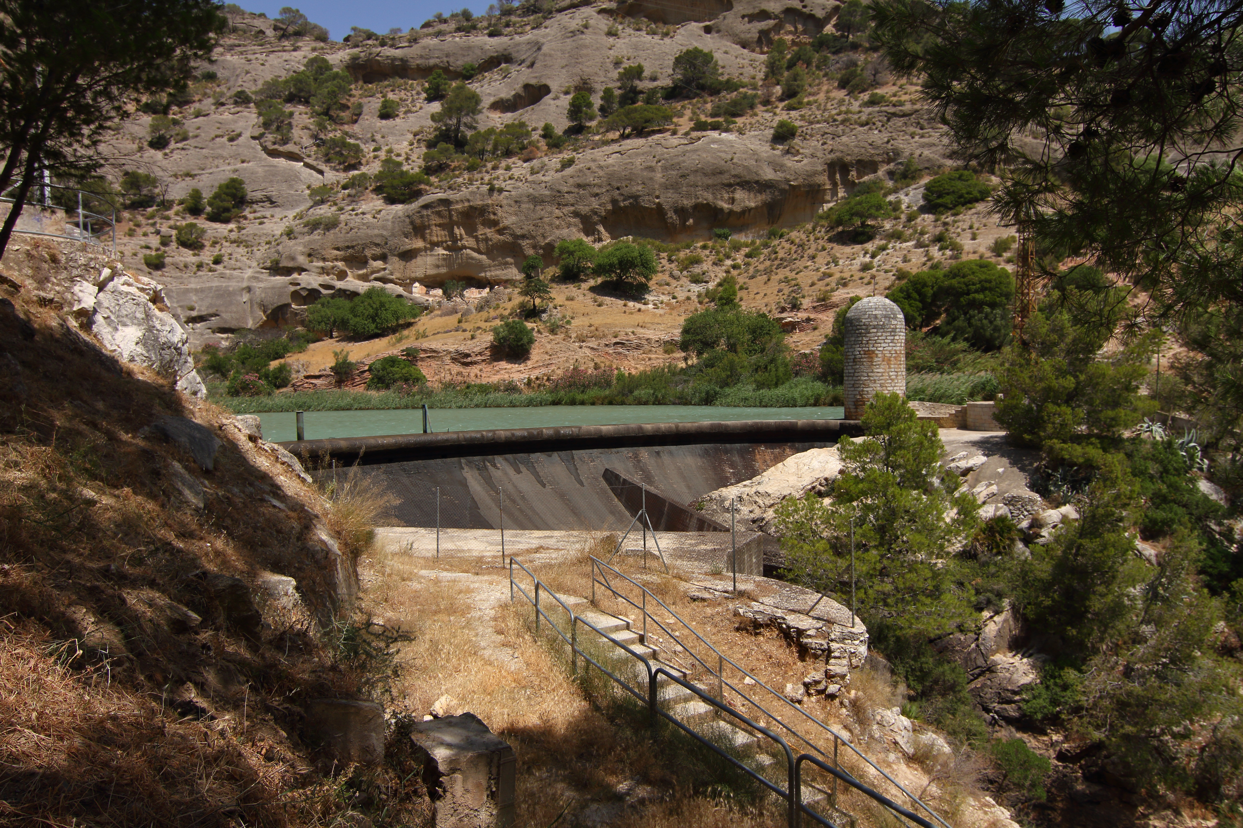 Presa de Gaitanejo